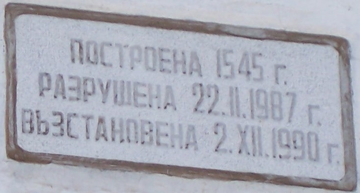 Плочата над входа на джамията Султан Баязид в село Кочан.